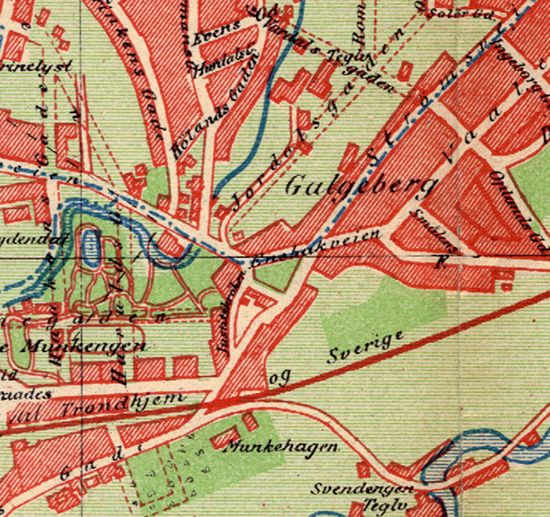 Galgeberg, Oslo.